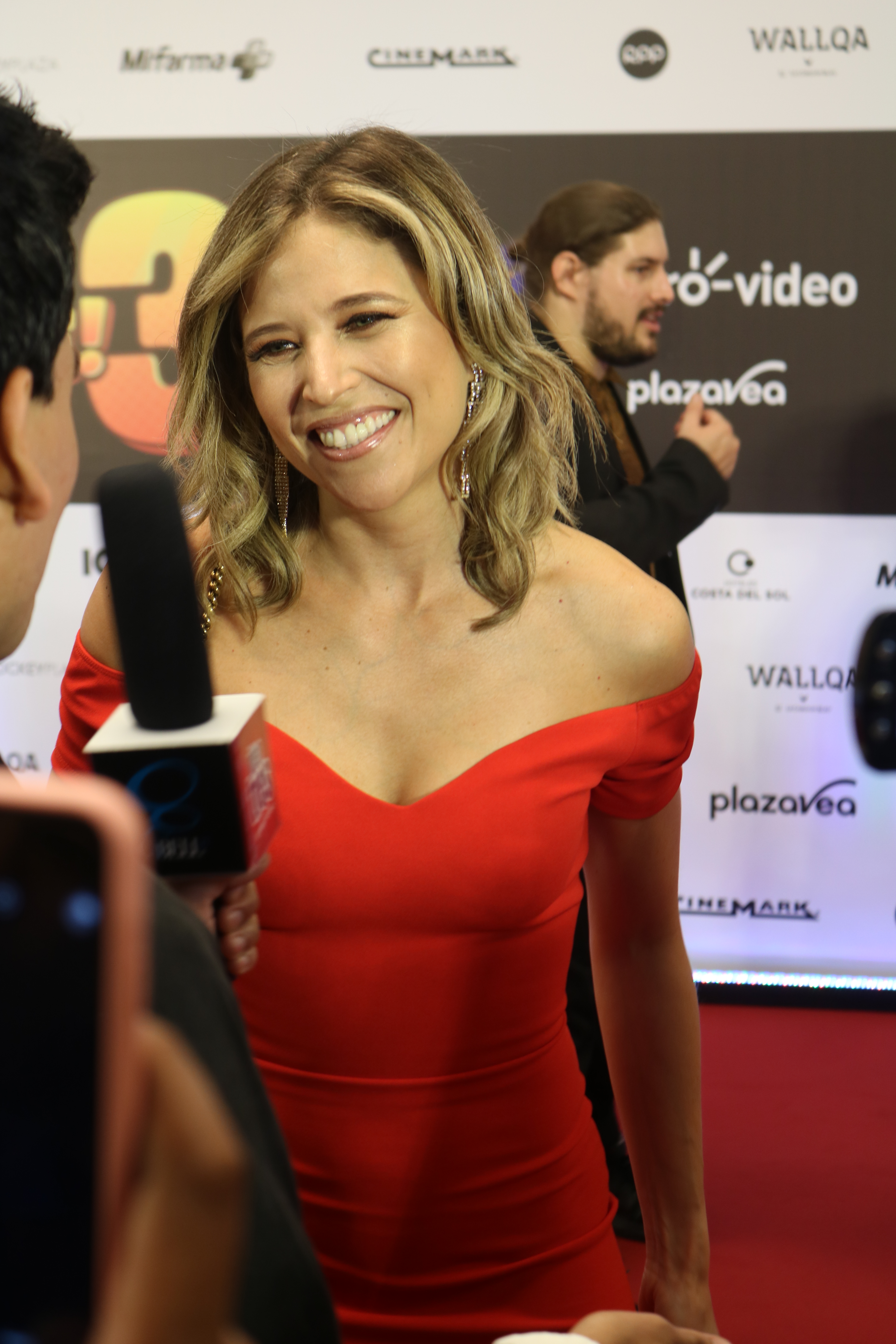 Anna Carina durante la alfombra roja de Asu Mare 3.